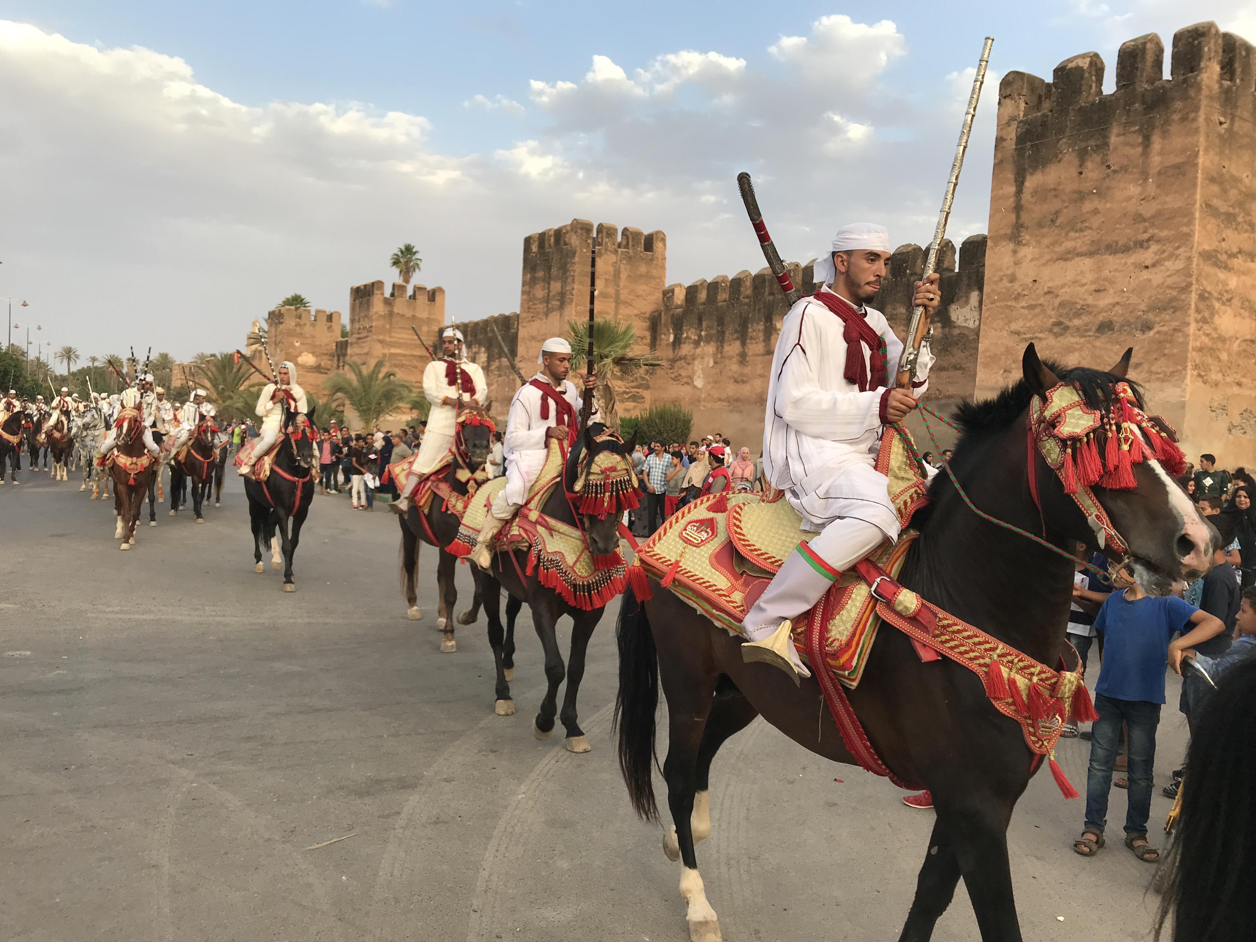 مهرجان التبوريدة السنوي الذي يقام بمدينة تارودانت